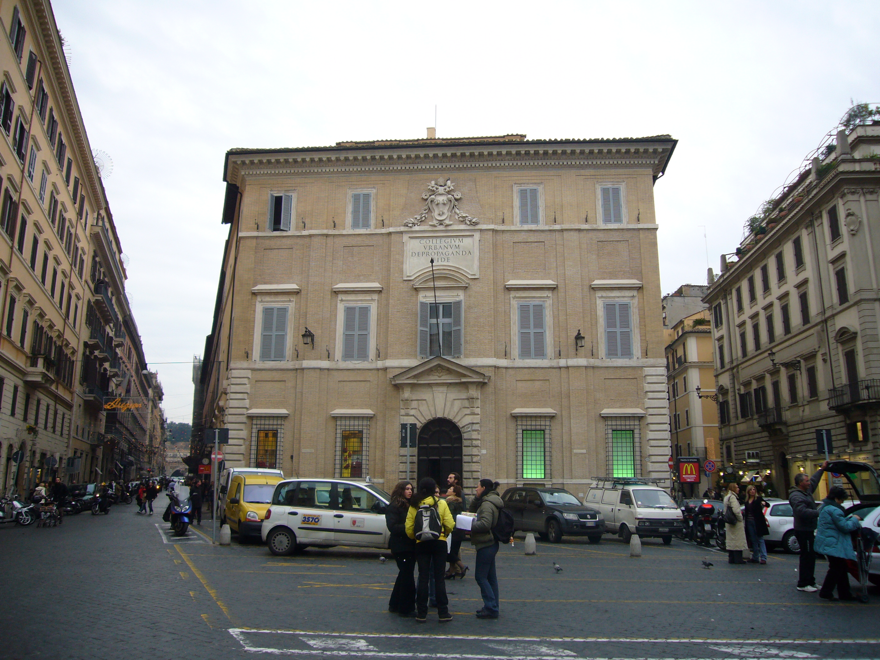 Roma, Collegio di Propagande fide, facciata verso piazza di Spagna